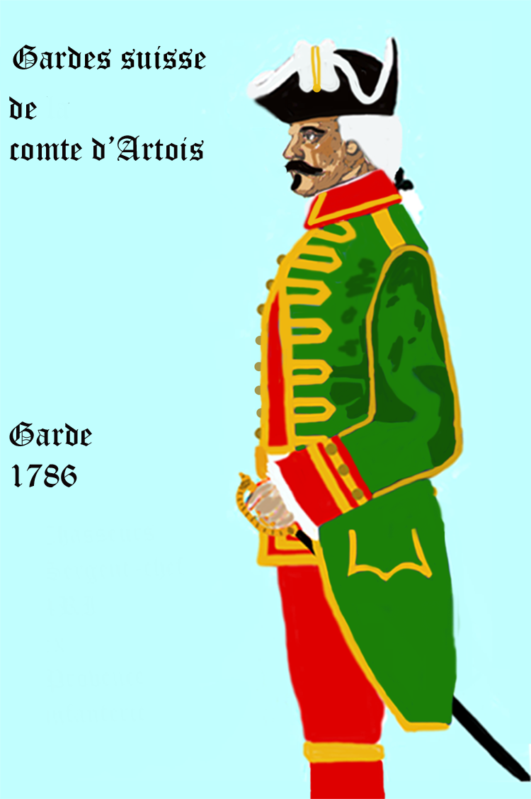 Uniform der Gardes suisses des Grafen von Atois (Hofdienst